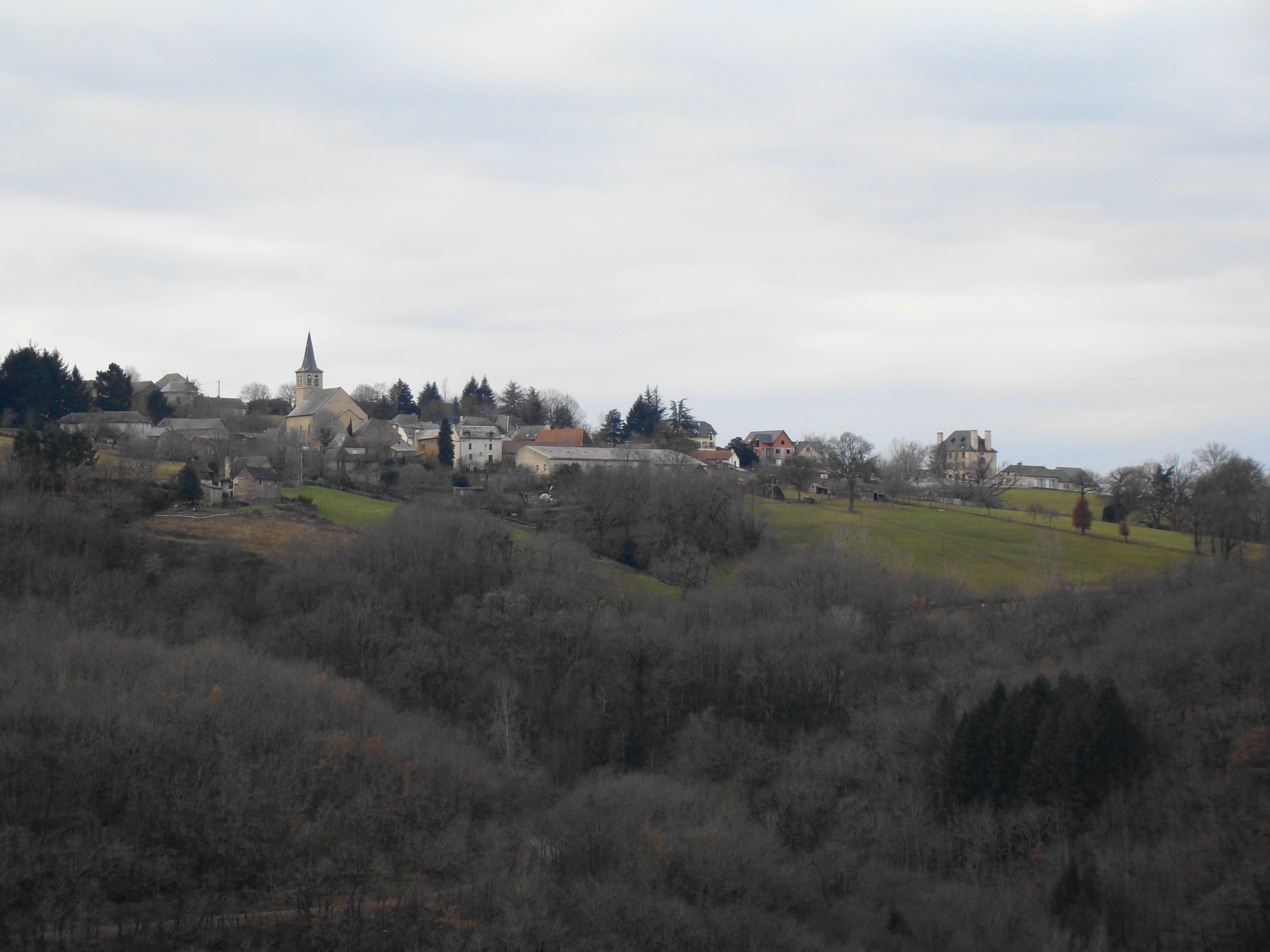 Le village vu du lieu-dit "La Baule" à Montirat (Tarn)